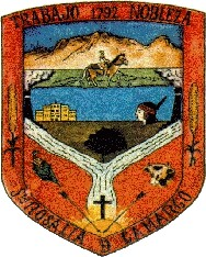 Escudo Camargo Chihuahua